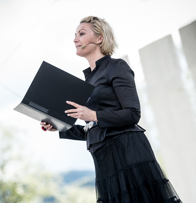 Foto: David Zadig. Grunnlovsjubileet 2014, Gulatinget